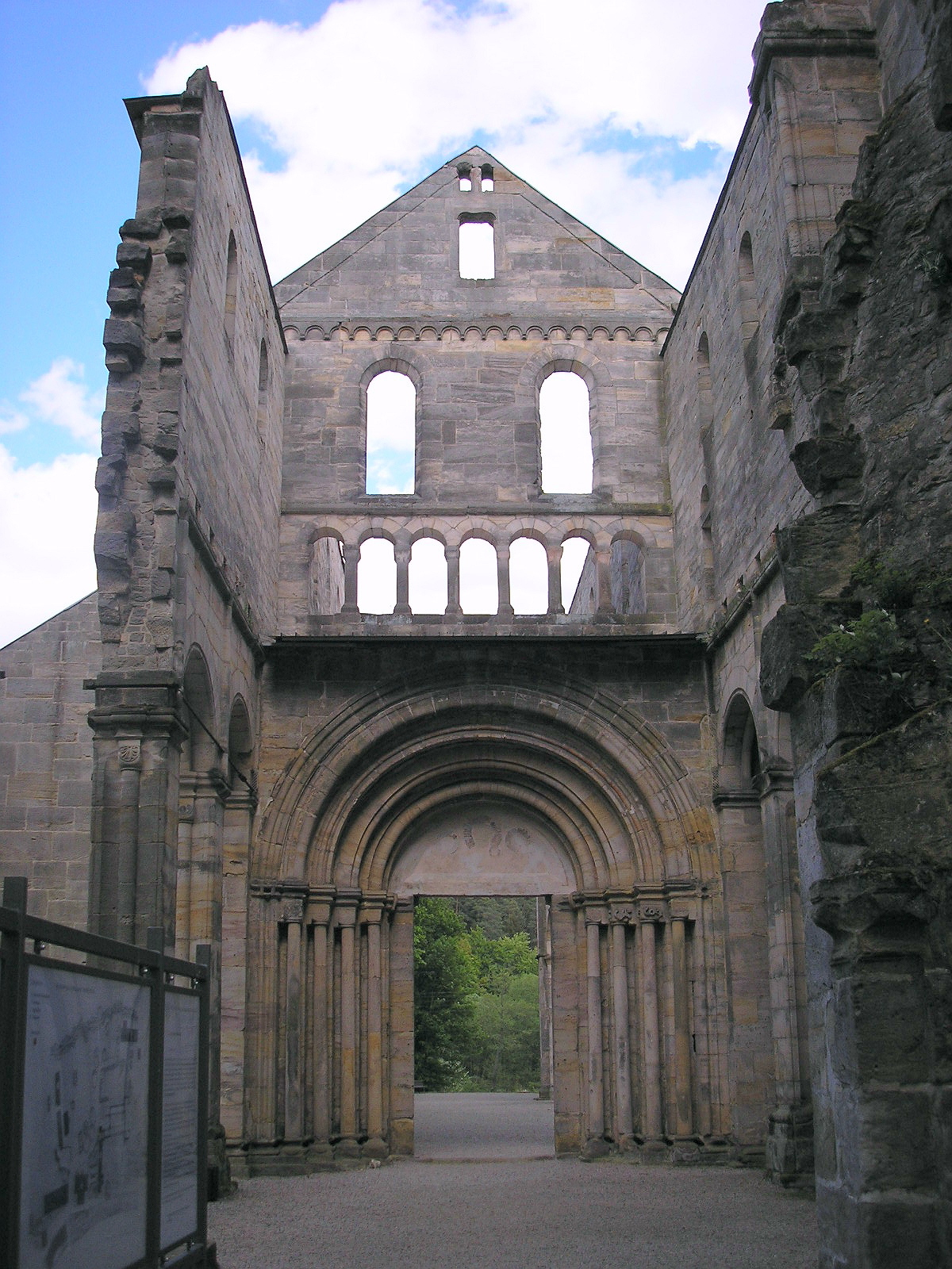 Westeingang der Klosterruine Paulinzella (Thüringen).